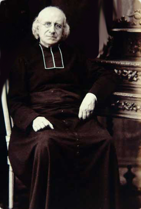 Fotografía de Álbum familiar